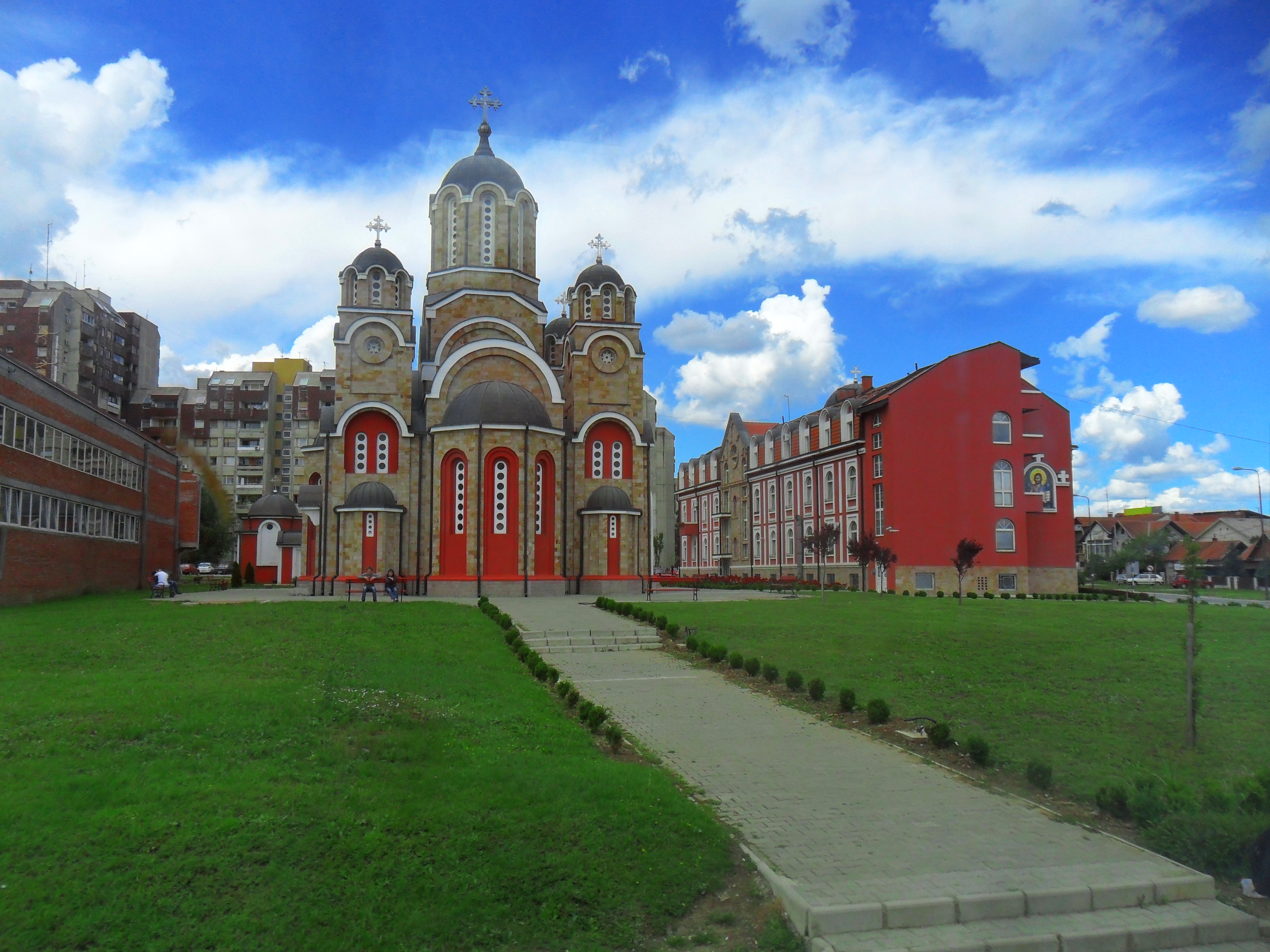 Саборни храм у Крагујевцу је посвећен празнику Успења Пресвете Богородице. План за изградњу нове цркве остварен је 1866 године.